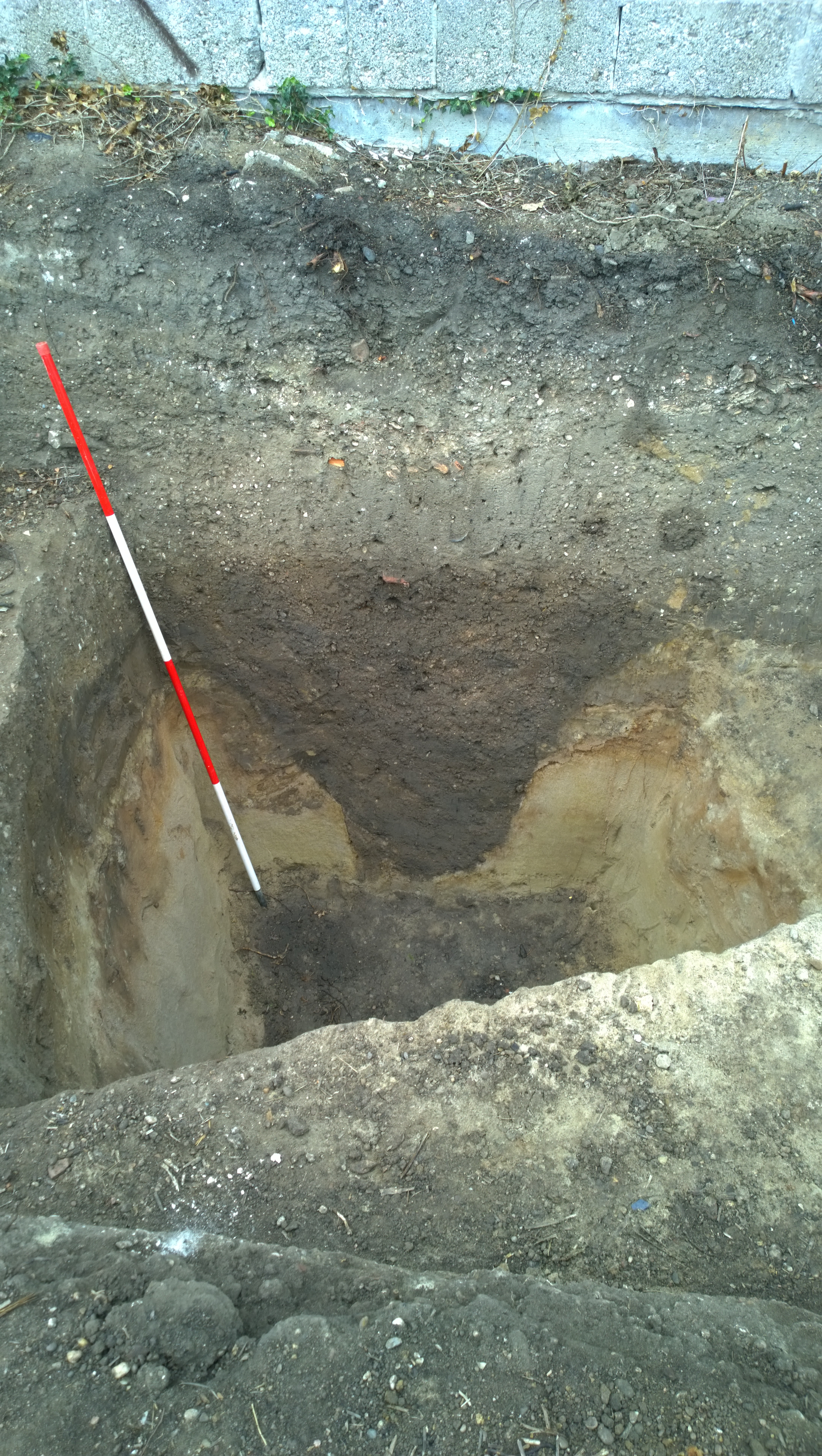 Bereich der Ausgrabung: V-förmiger Verteidigungsgraben des Kastells. Besichtigung zum Tag des Offenen Denkmals.